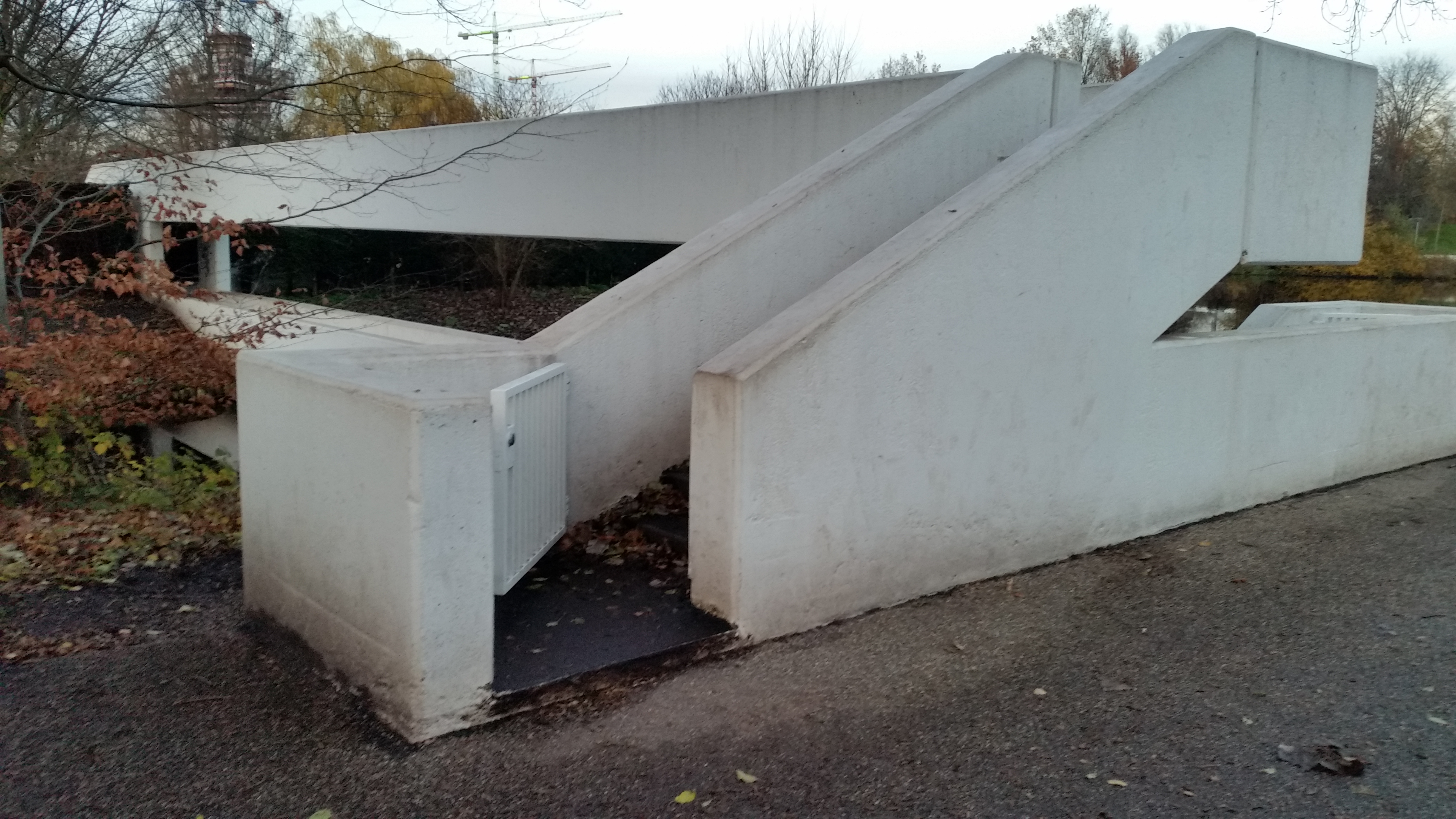 Toegang naar bovendek Brug 482 (in Amsterdam)